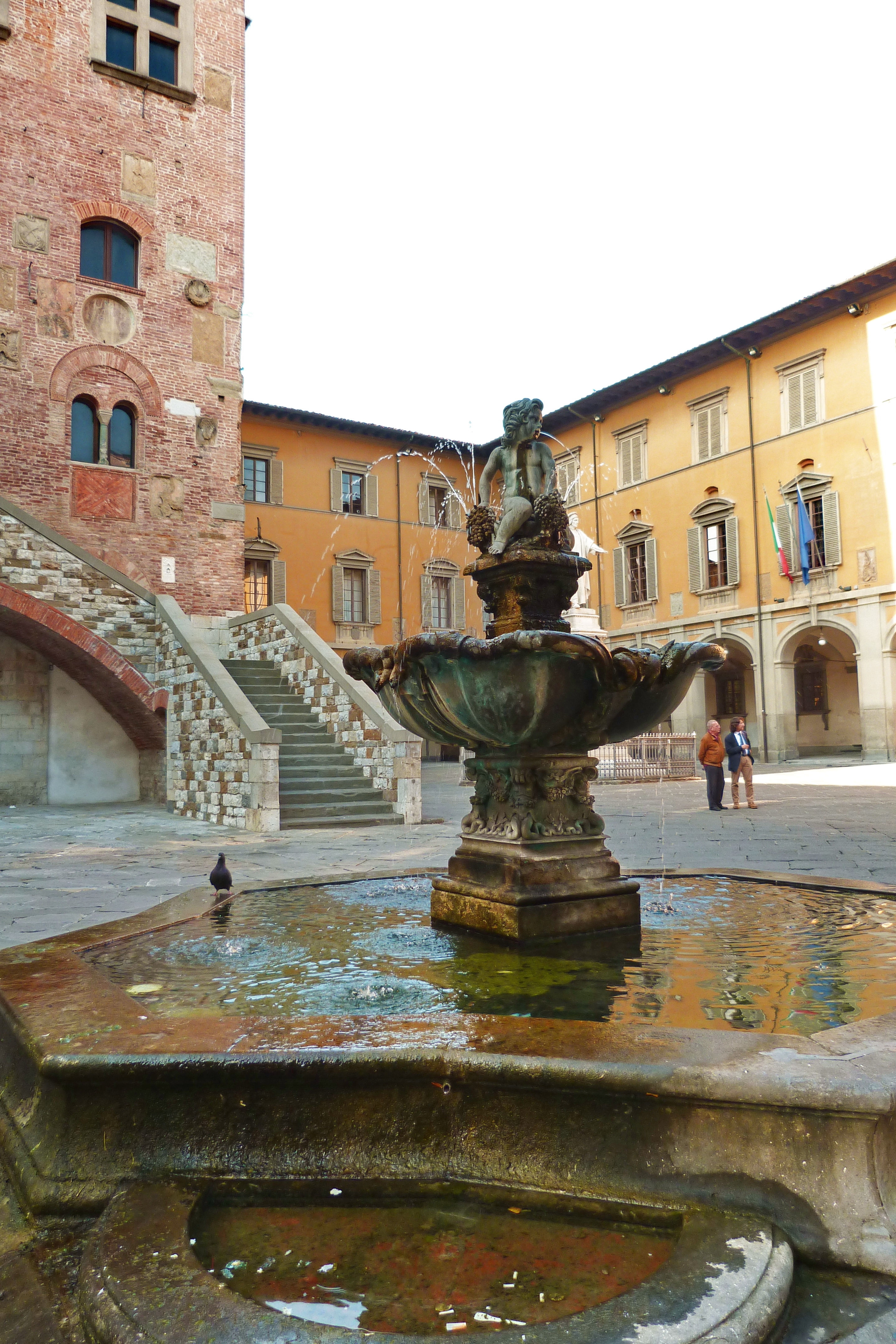 Fontana del Bacchino, Prato, Toscana, Italia This is a photo of a monument which is part of cultural heritage of Italy.